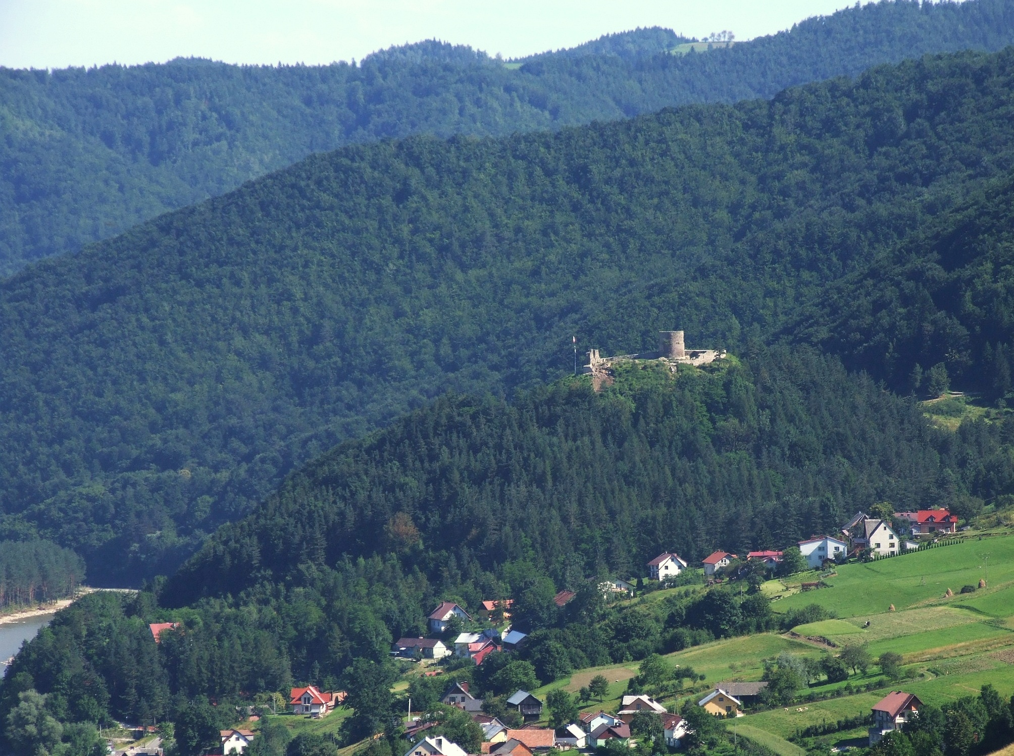 Rytro Castle. Zamek w Rytrze, widok z Pasma Radziejowej